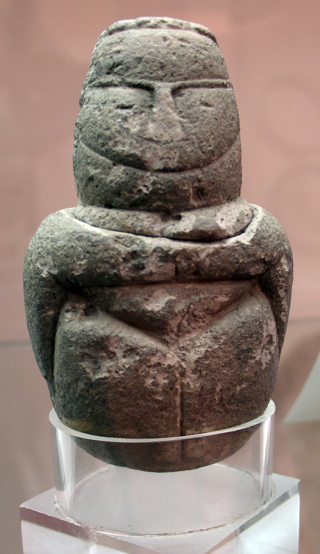 Museo archeologico nazionale G.A. Sanna - MIBAC The making of this document was supported by Wikimedia CH. (Submit your project!) For all the files concerned, please see the category Supported by Wikimedia CH. This is a photo of a monument which is part of cultural heritage of Italy.